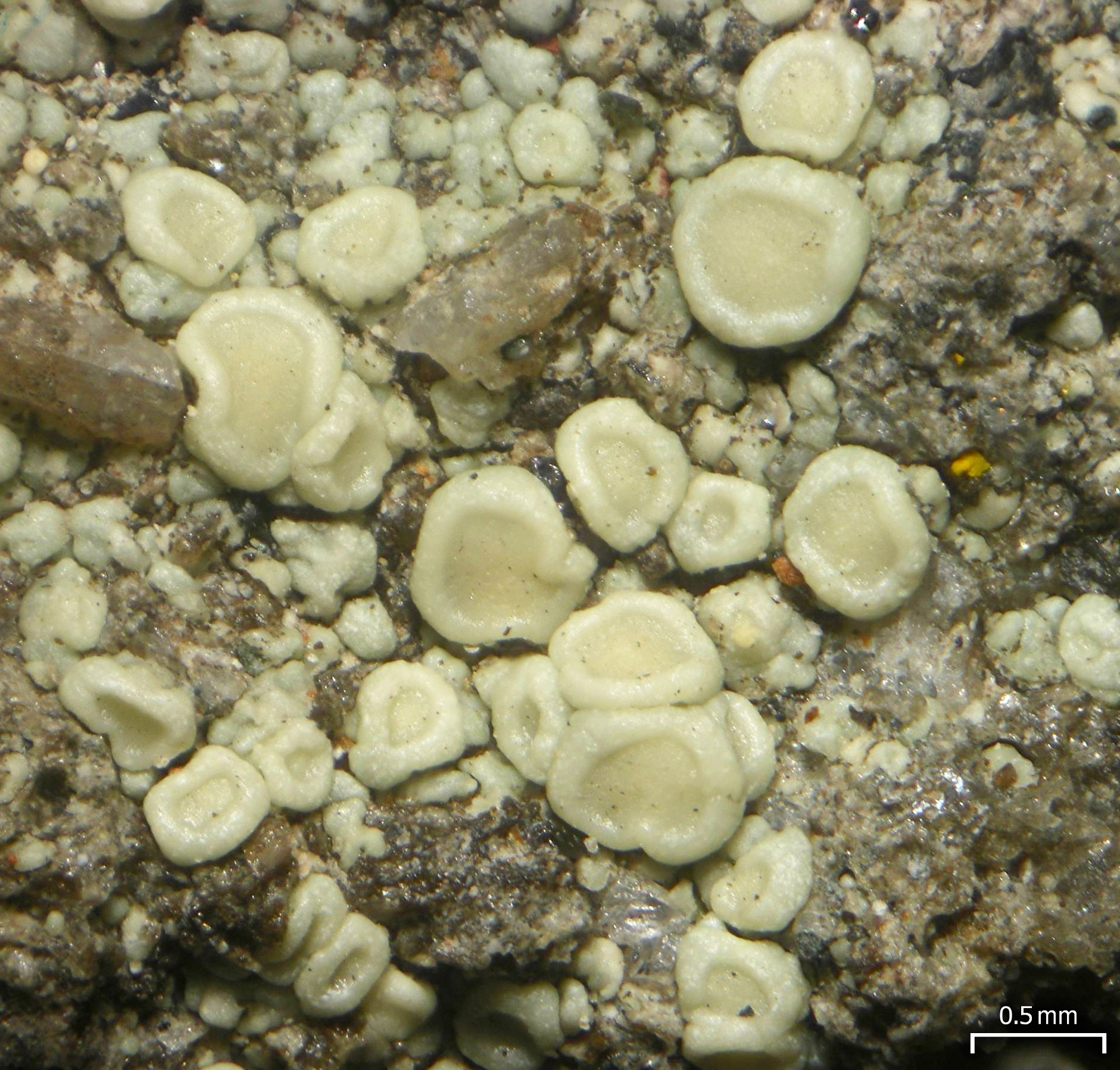 Mount Rose, Nevada, 20140603, #6455b pers. herb.